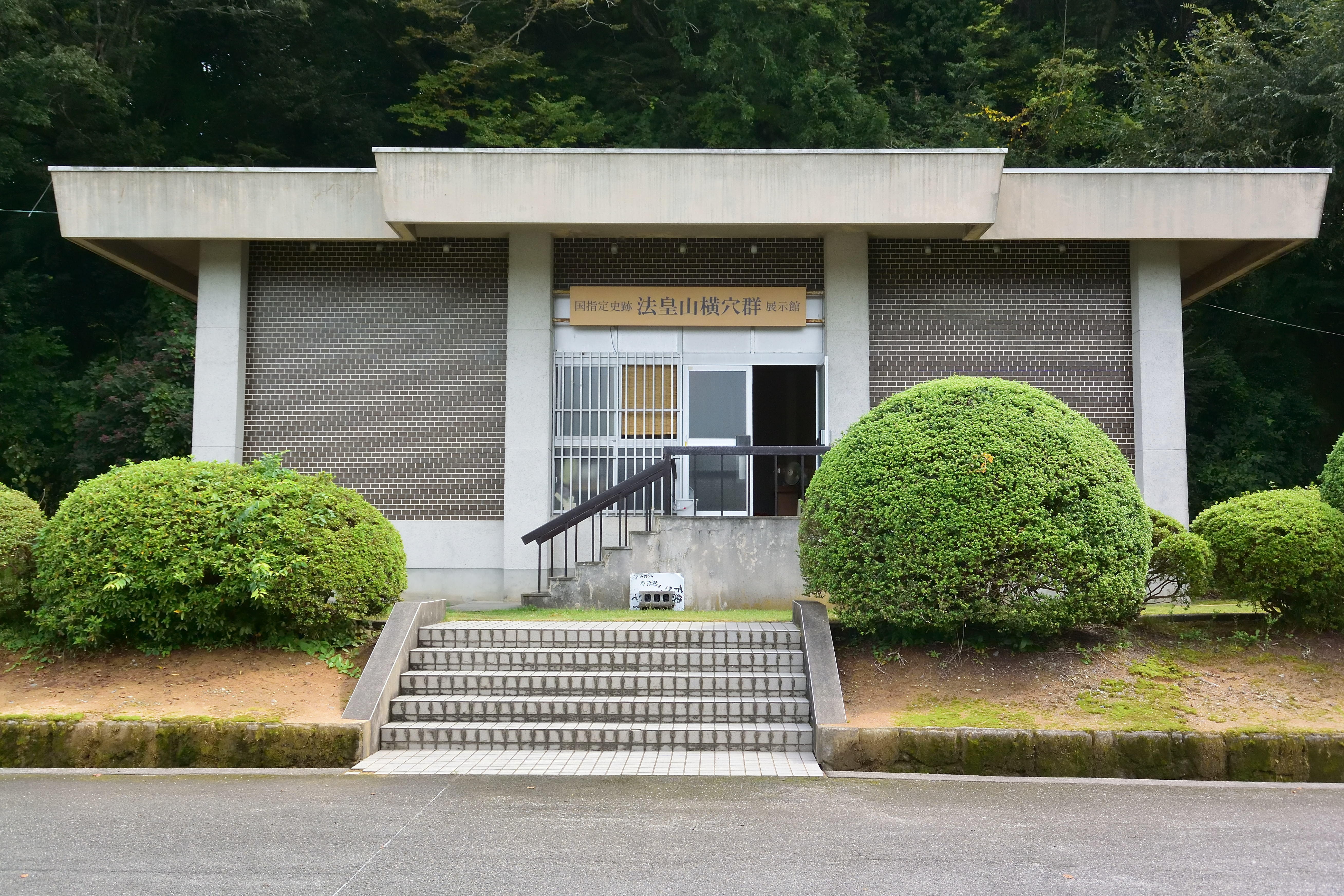 法皇山横穴古墳展示館